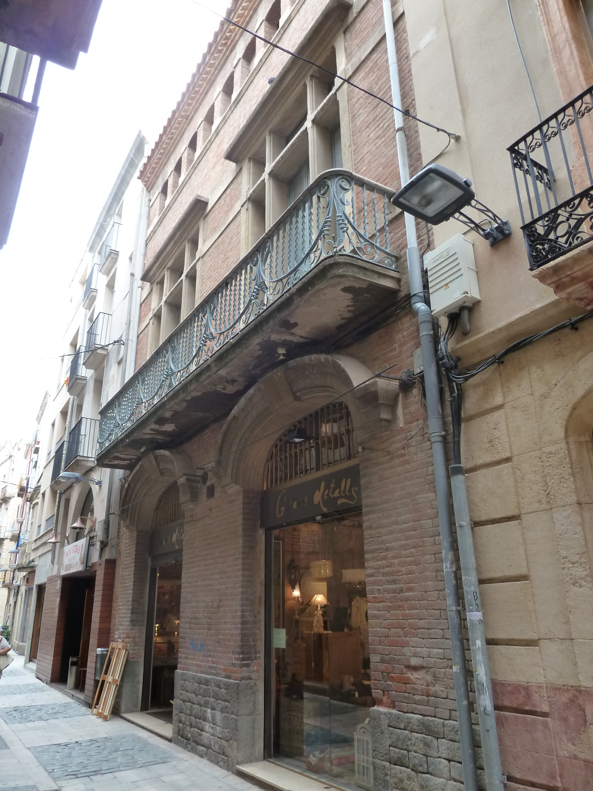 Reus